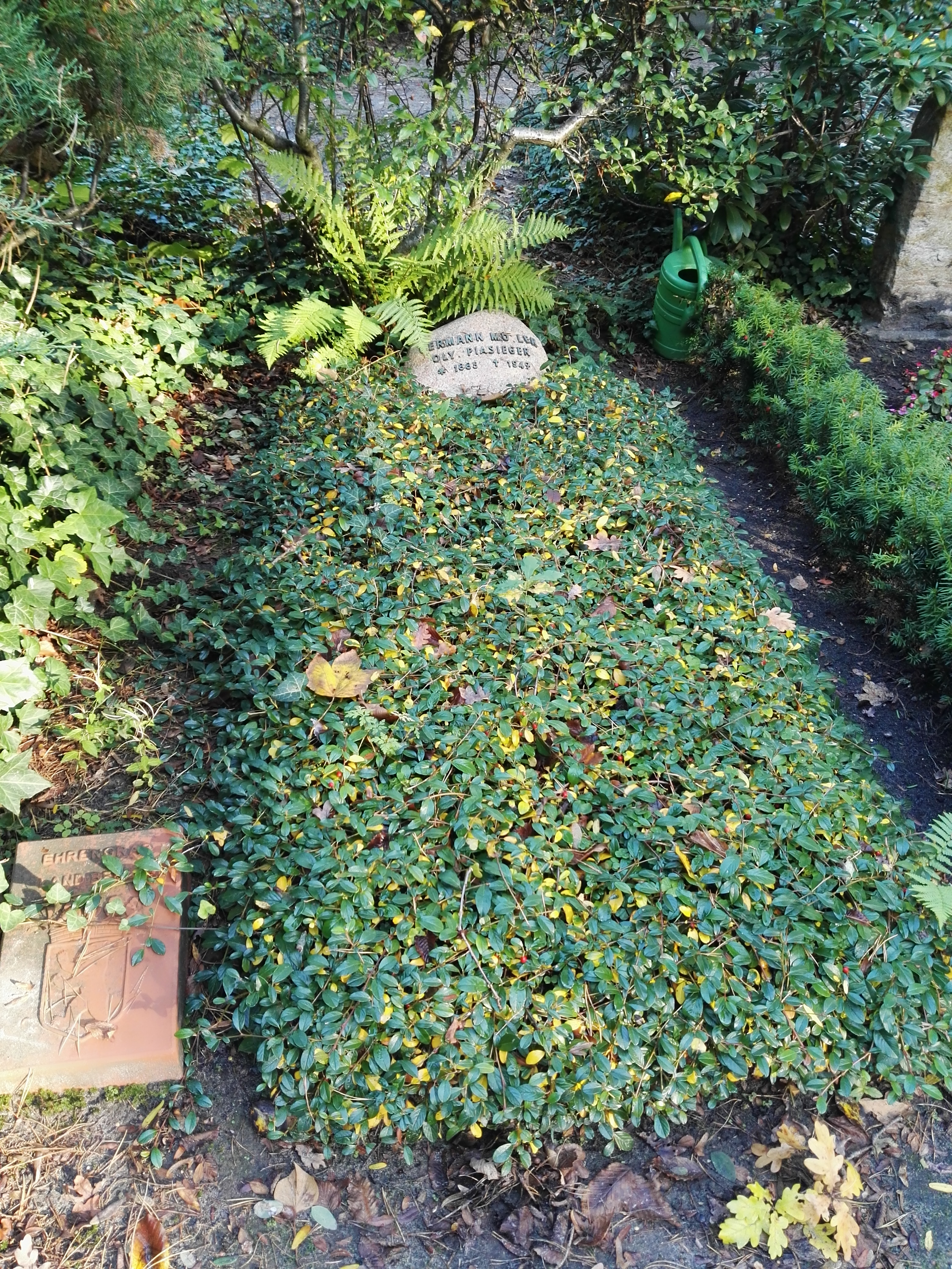 Grab des Leichtathletik-Olympiasiegers Hermann Müller auf dem Friedhof Heerstraße in Berlin; Ehrengrab